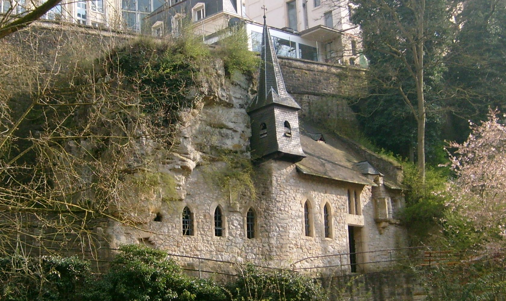 D'Greinskapell am Péitrussdall. 13.04.2008.